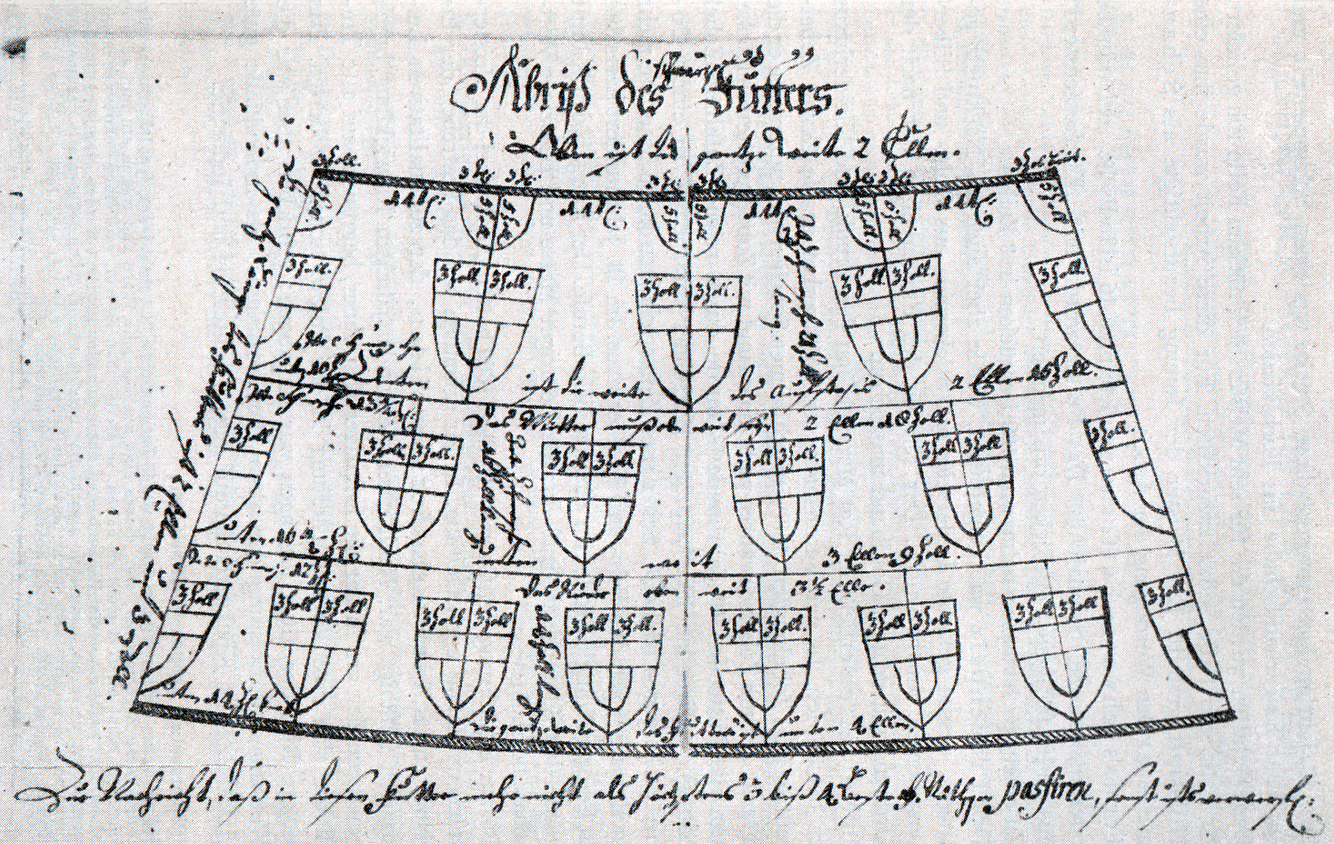 Abriß des schwarzen Schmaschenfutters. Schnittmuster eines schwarzen Futters mit Ornamenten (Kirchenfenster). Aus dem Jahre 1796. Aus dem Begleittext: Für das schwarze Futter verwendete man 16 isländische, seeländische oder ukrainische Schmaschen. Das Futter wurde mit ‚Kirchenfenstern‘ aus andersfarbigen Fellstücken ornamentiert.